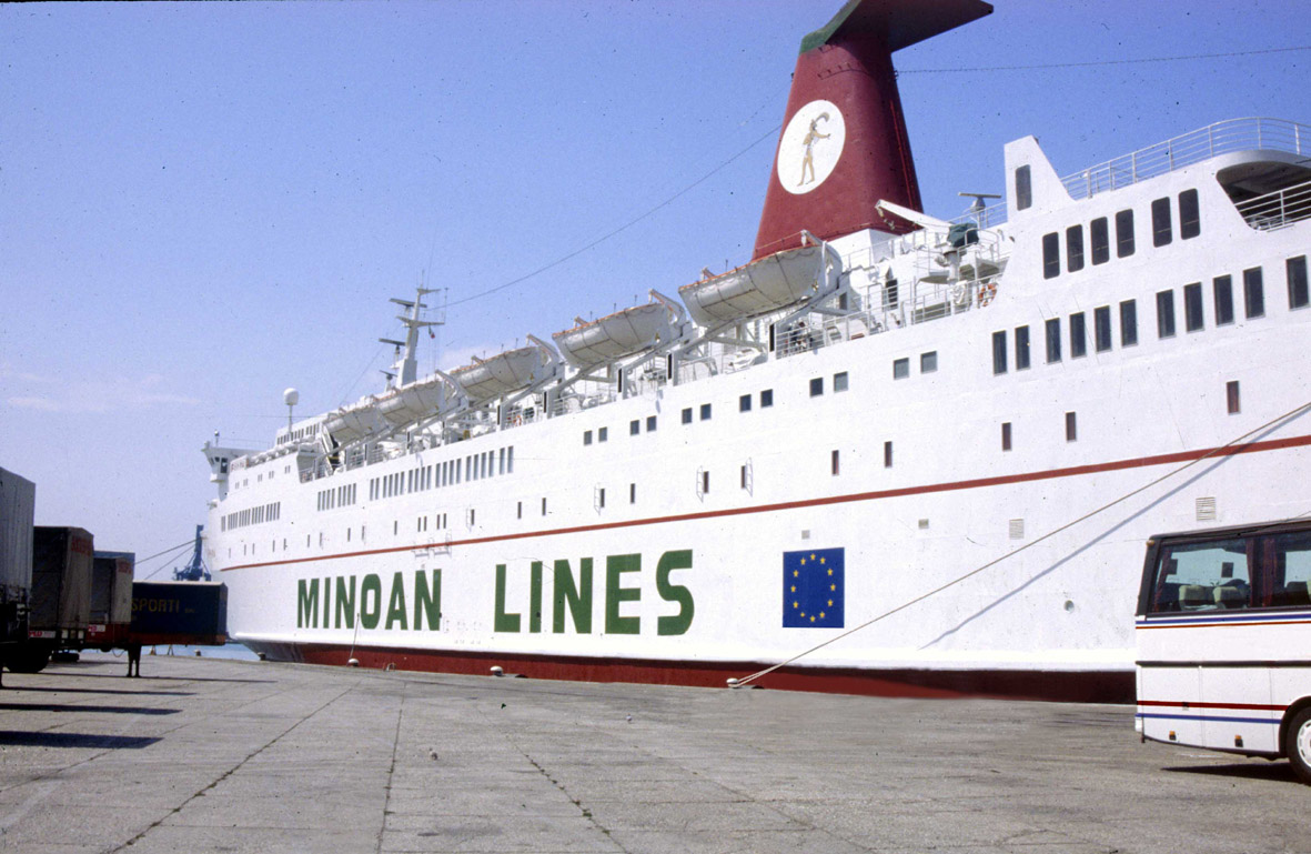 F/B Fedra (Bj. 1974, Minoan Lines: 1987-2000)